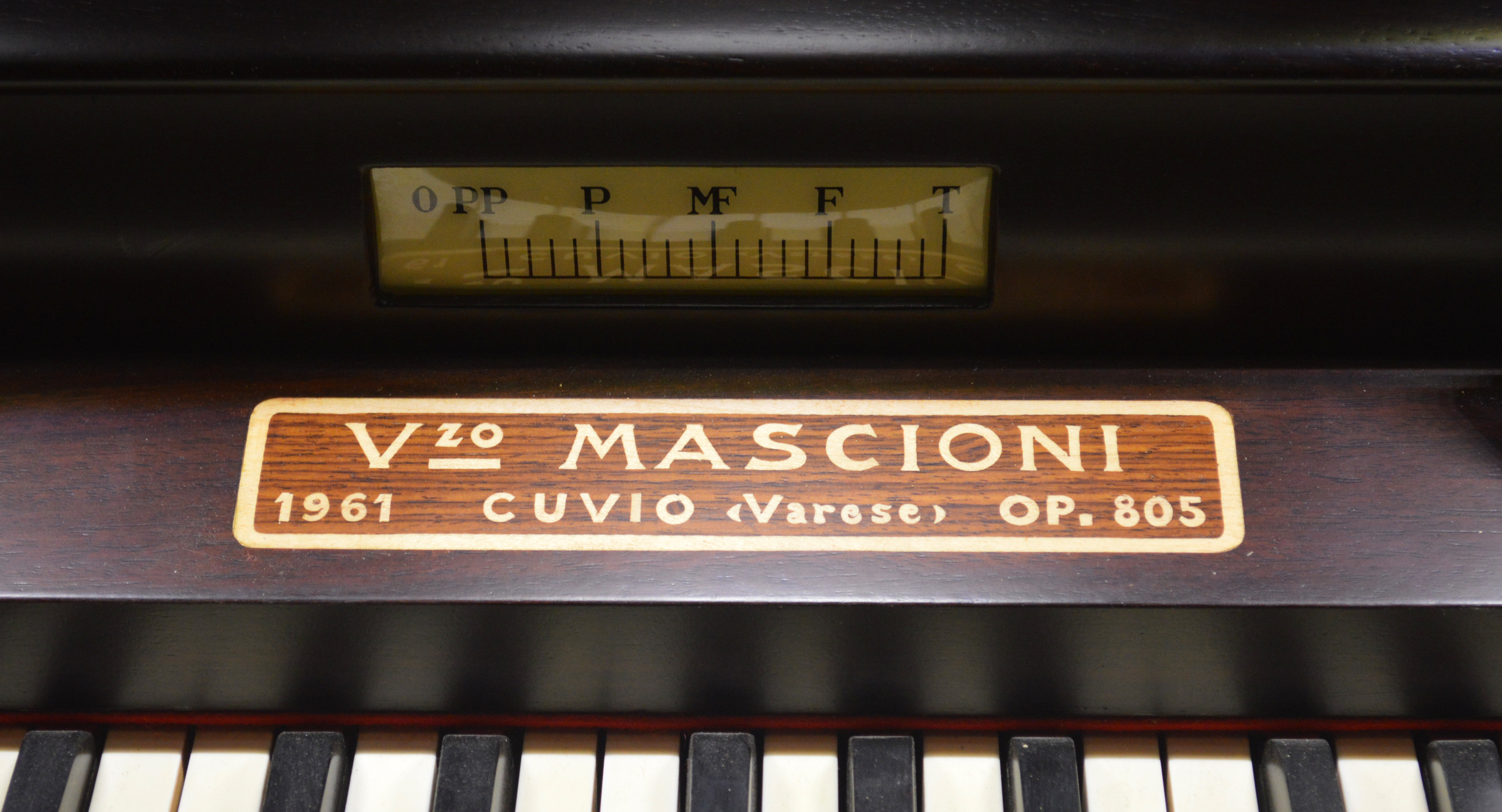 Particolare della consolle a tre manuali (situata nella cappella di San Jacopo) con l'indicatore del crescendo e la targhetta che riporta il nome del costruttore, l'anno di costruzione e il numero d'opera dello strumento.